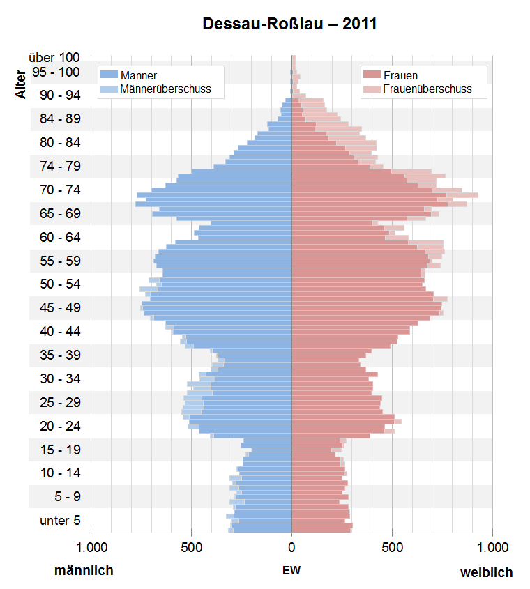 Bevölkerungspyramide der Stadt Dessau-Roßlau nach Zensus 2011.